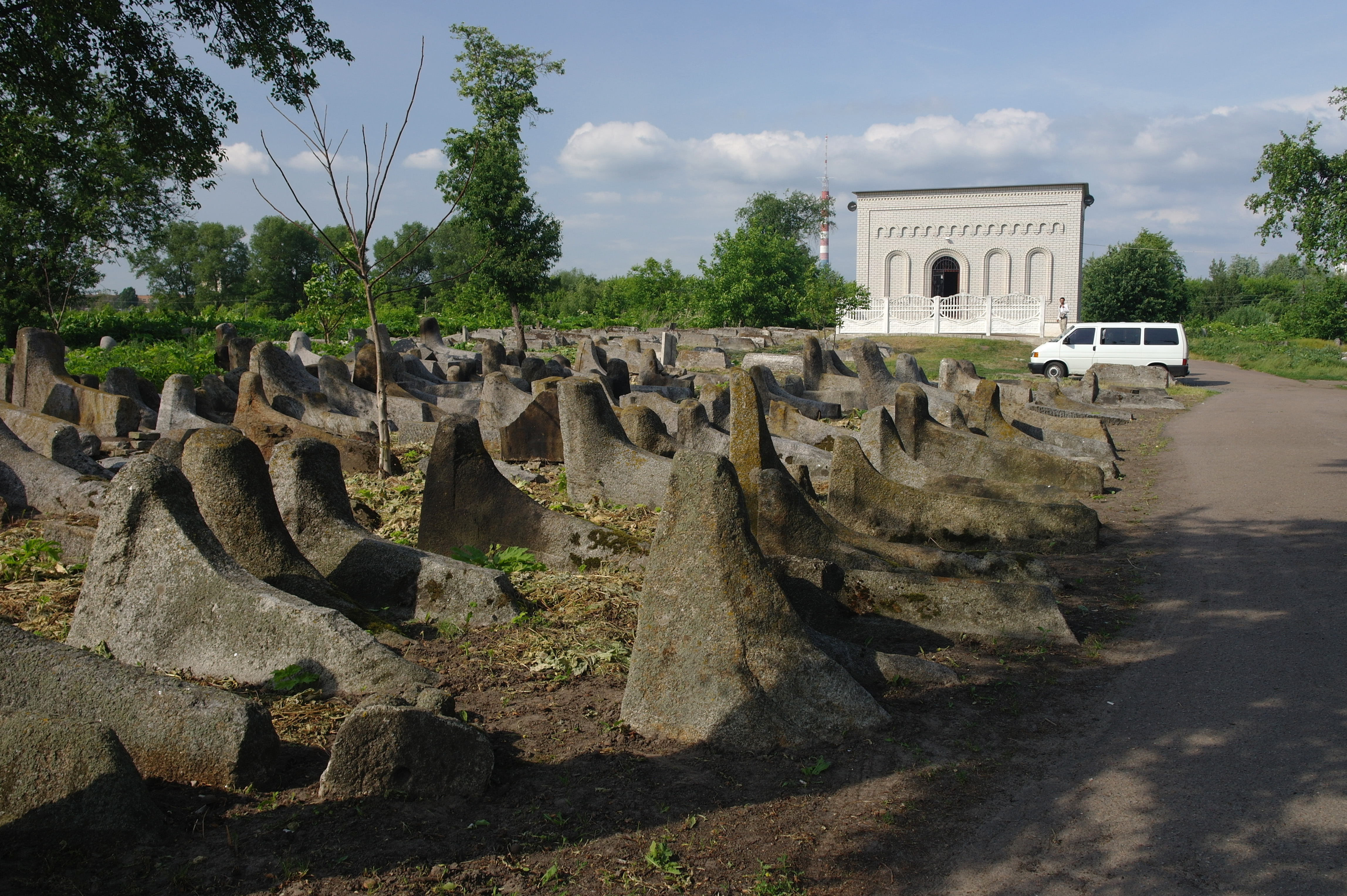 Беричівський кіркут та пантеон на могилі цадика Леві Іцхака Бердичівського